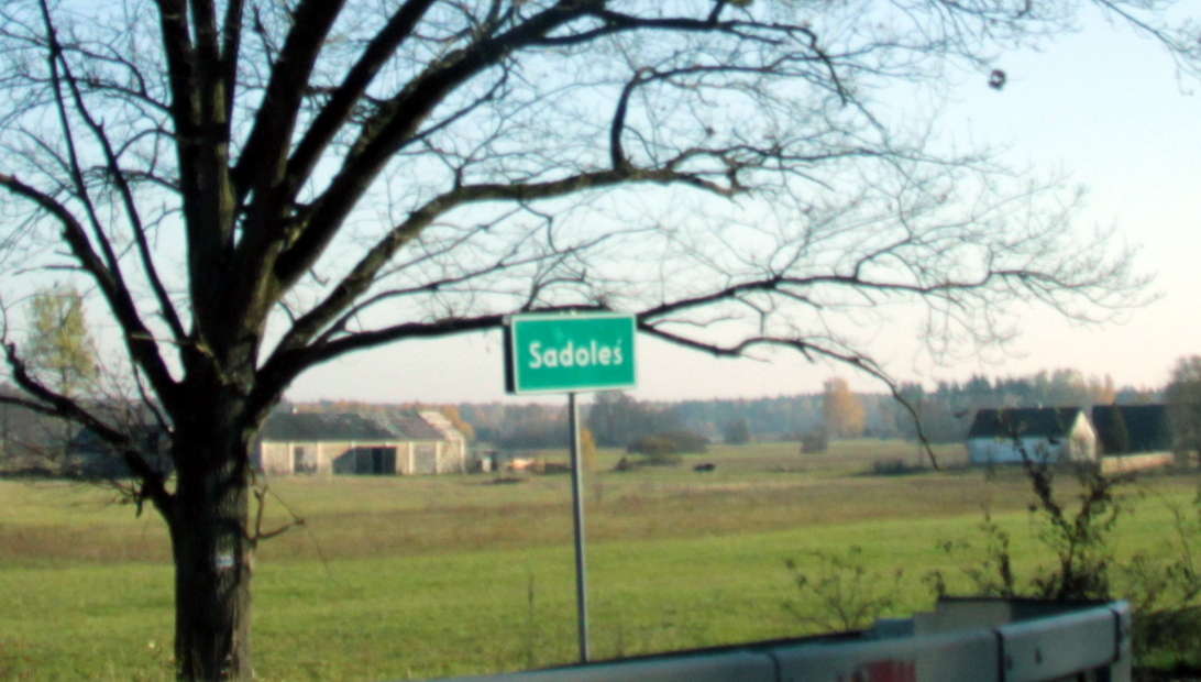 Sadoleś gm. Sadowne, woj. mazowieckie